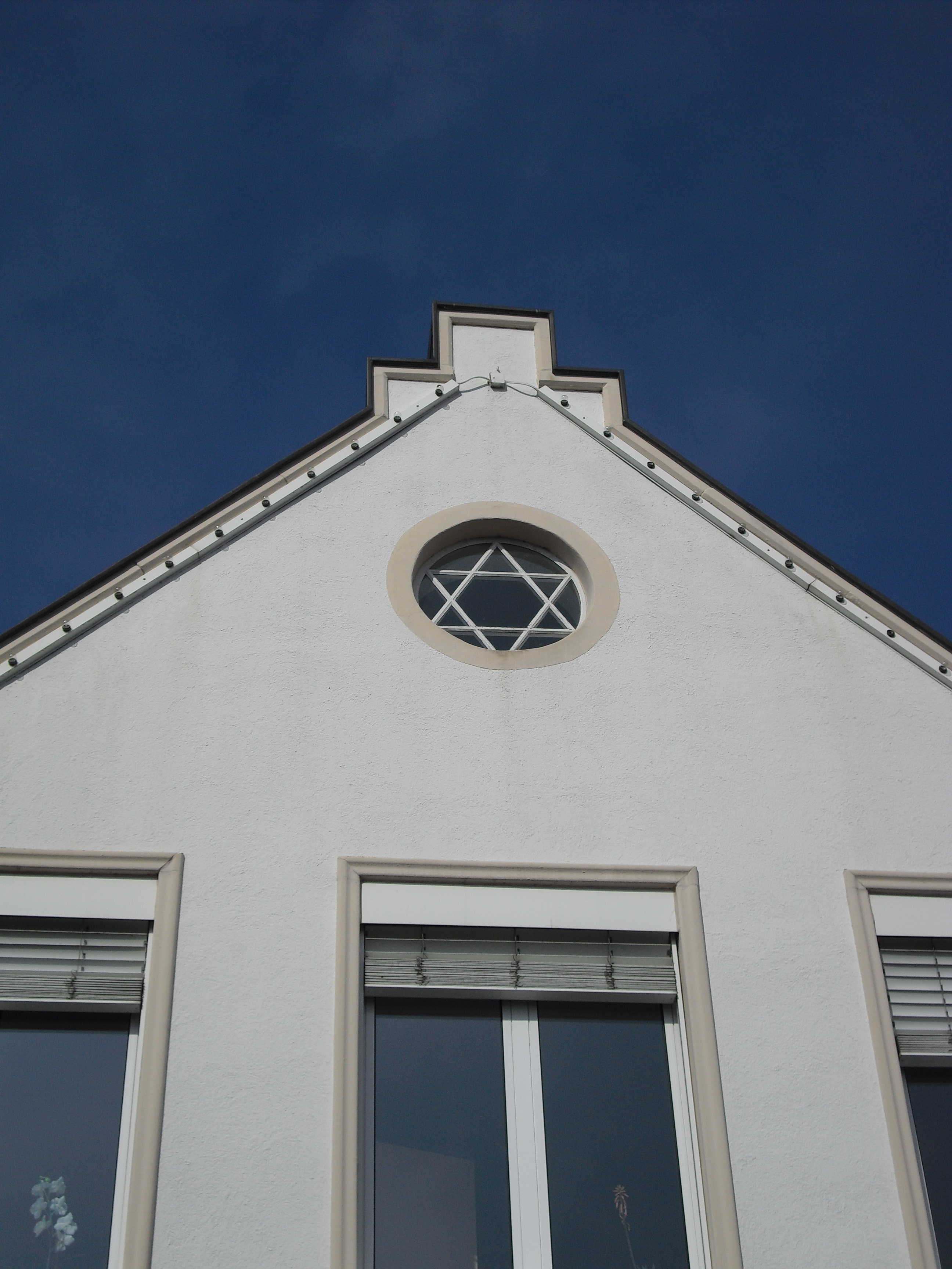 Magen David im Giebelfenster eines jeverschen Hauses